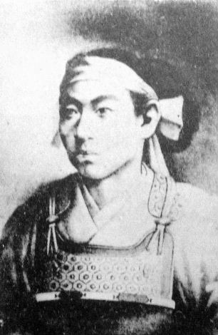 a Japanese man 久坂玄瑞 (Genzui Kusaka)